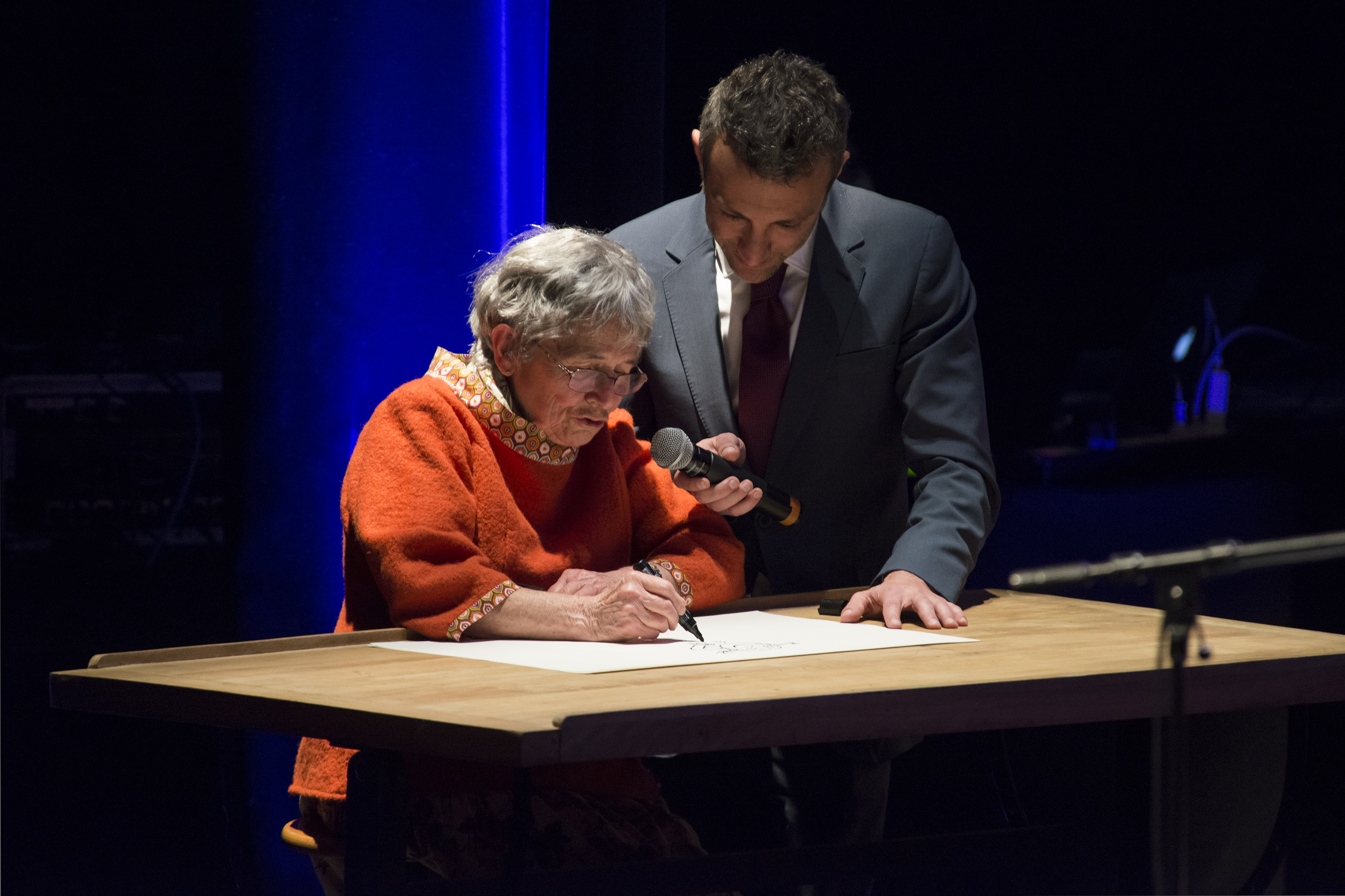 Bernadette Després, Fauve d'honneur au Festival International de la Bande Dessinée d'Angoulême 2019.